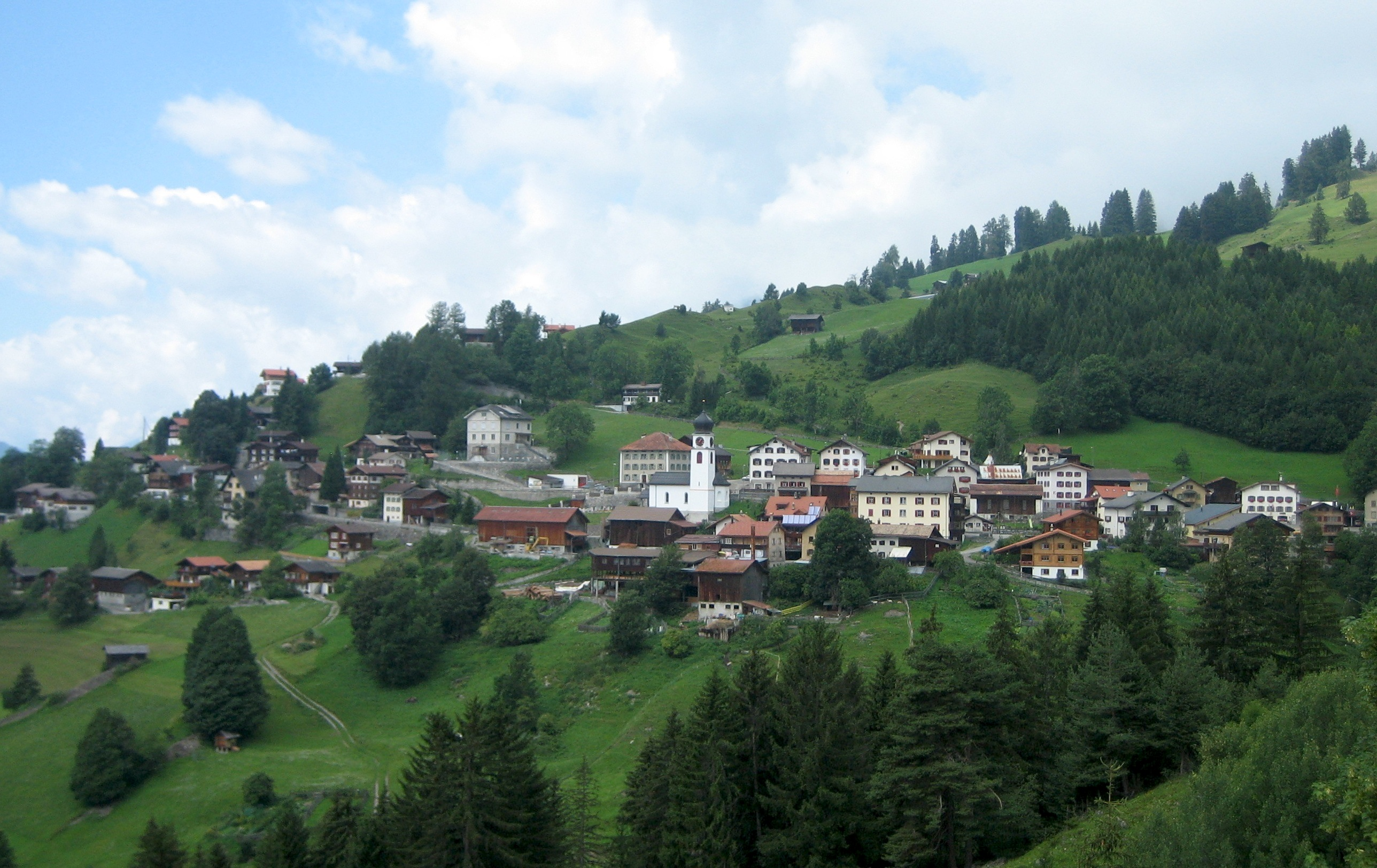 Peist